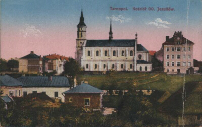 Костьол Єзуїтів у Тернополі: Вигляд з вулиці Сінкевича